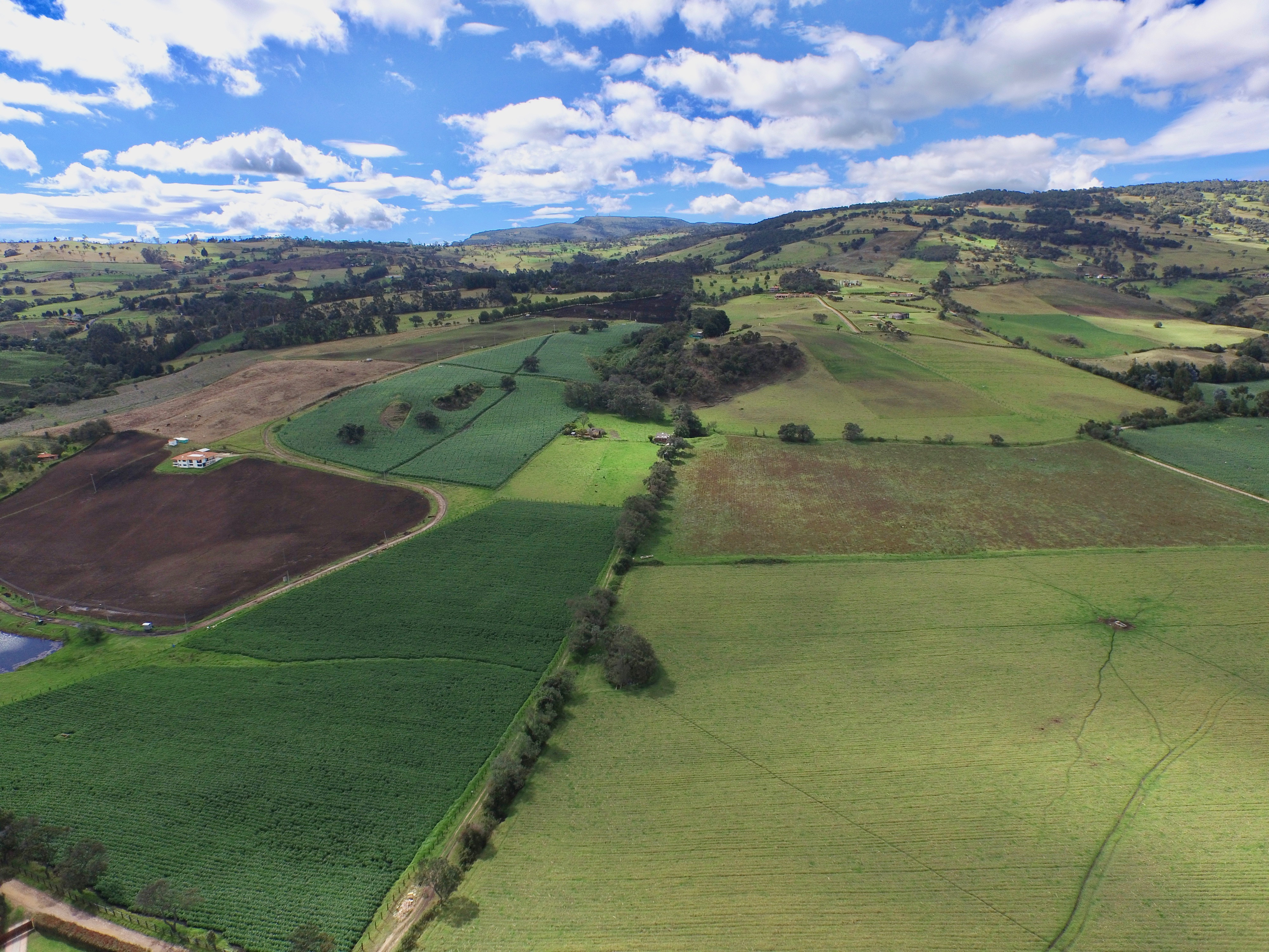 Vista aerea Campo Amalia o Valle de Santa Barbara